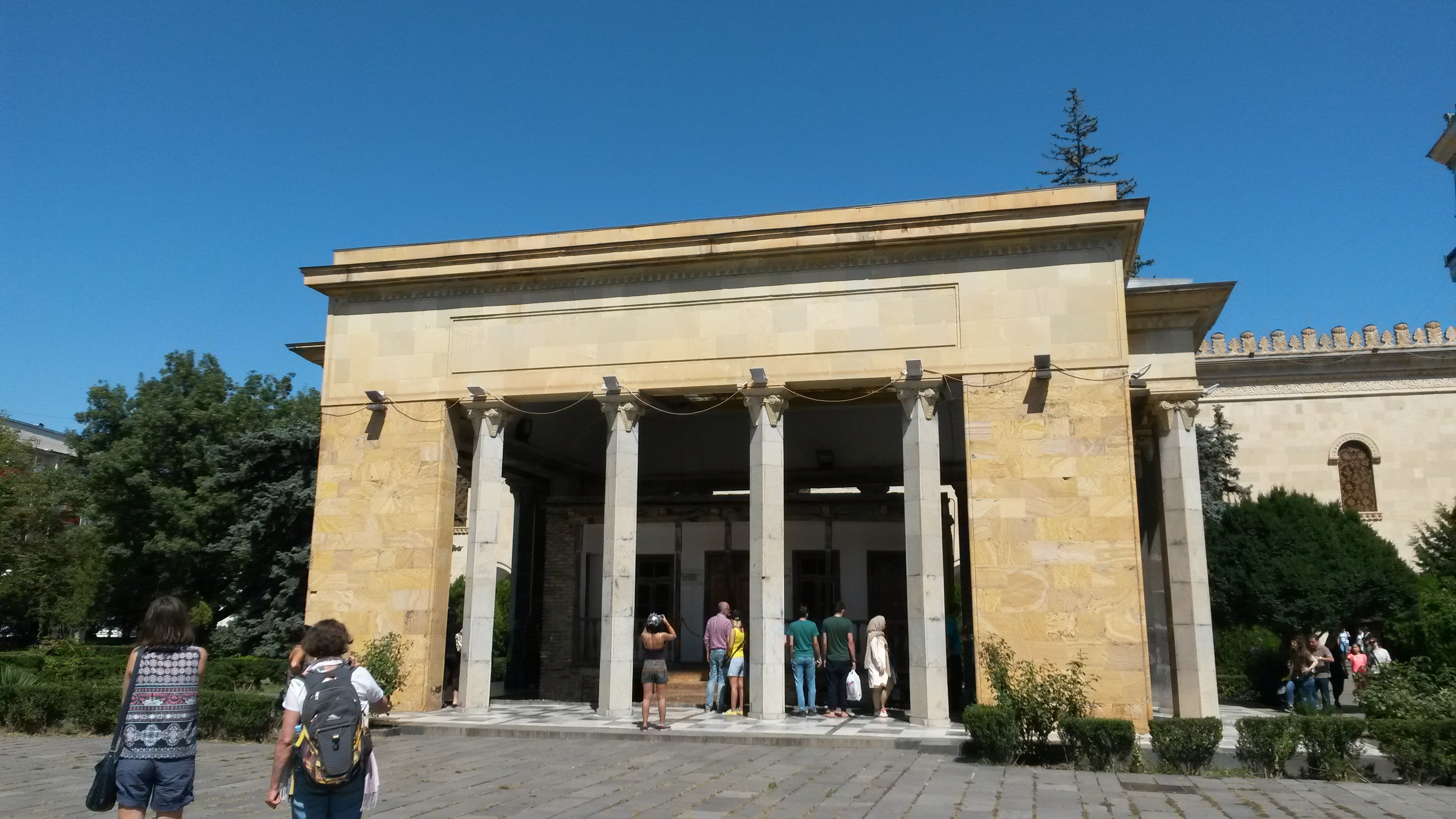 სტალინის სახლი